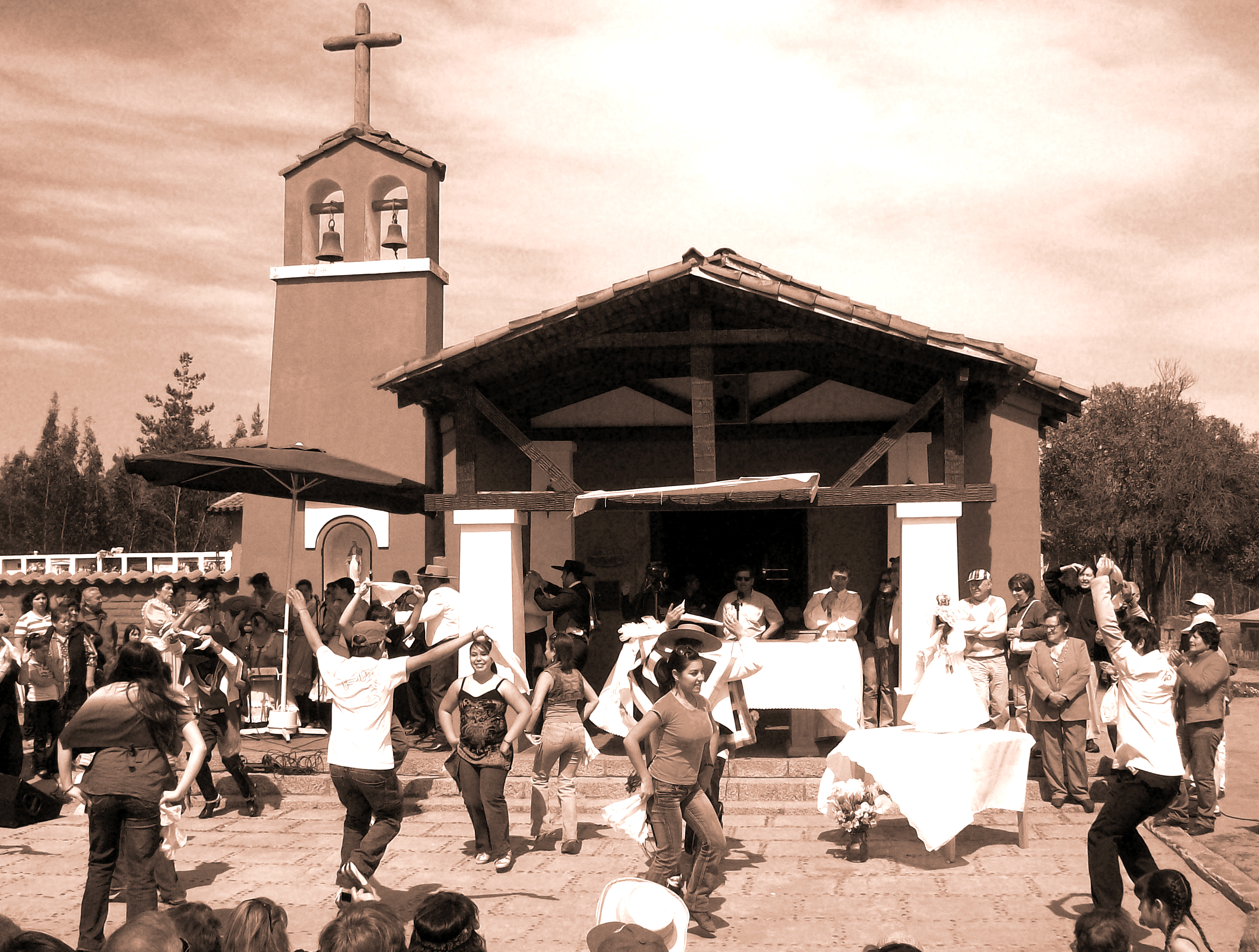 Misa chilena en la iglesia del Totoral, en la región de Valparaíso, Chile.